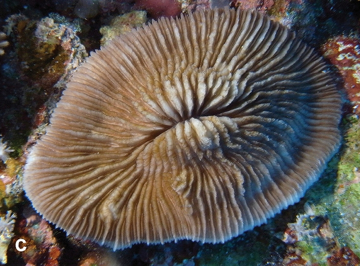 Pleuractis moluccensis en Pulau Layang-Layang, islas Spratly, 2013.